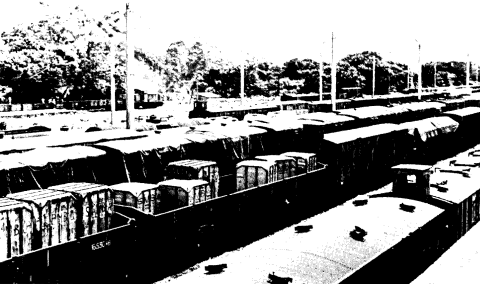 Rolling stock, Kamina switching yards, Kamina, Zaire. Almost 20 percent of SNCZ wagons are more than 50 years old. Reliability of wagon is poor, and the system depends a great deal on the use of rented South African Railroad wagons.